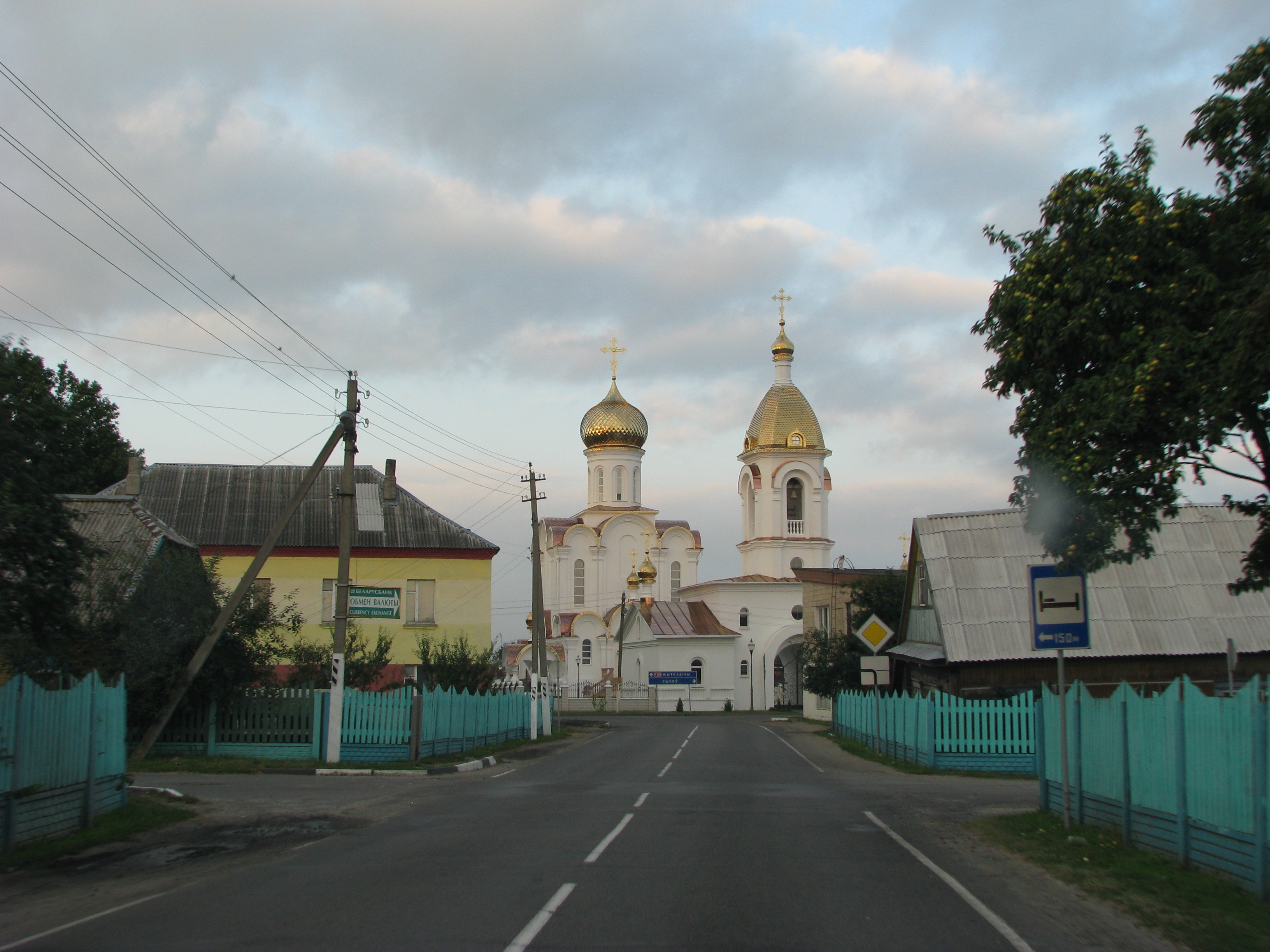 Turaŭ, Belarus